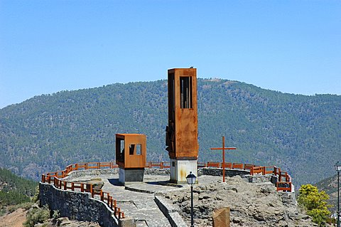 Monumento a los pinares